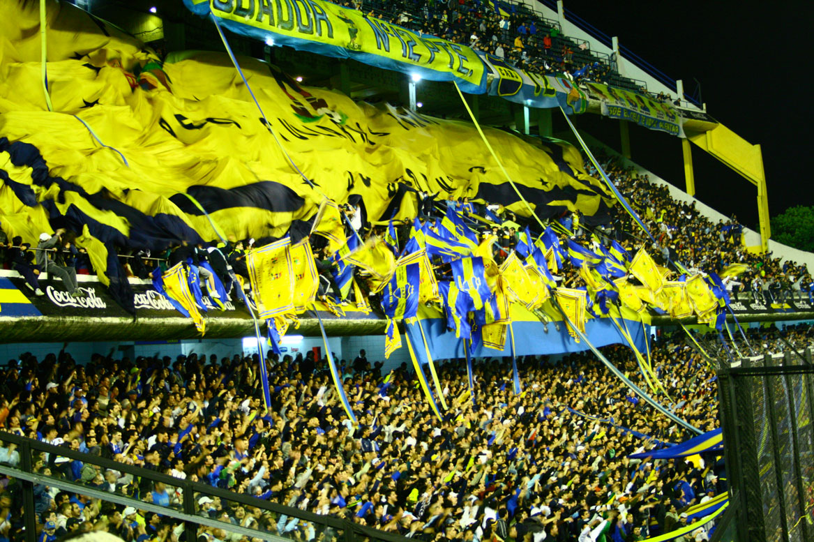 Hinchada de Boca Juniors en La Bombonera